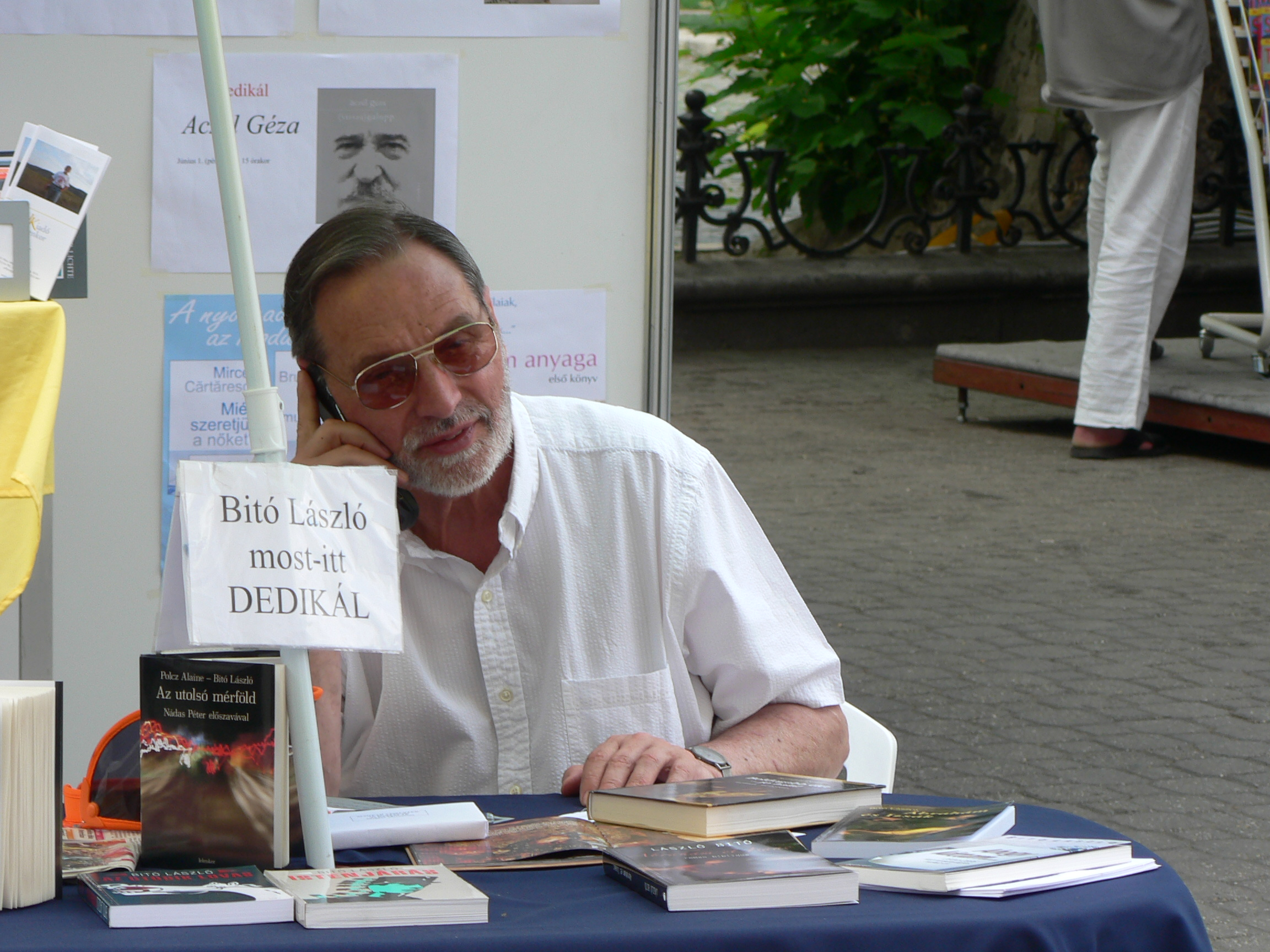 Bitó László a 78. Ünnepi Könyvhéten, 2007. június 4-én a budapesti Vörösmarty téren. A felvétel megjelent Creative Commons alatt a Metapolisz DVD sorozatban.